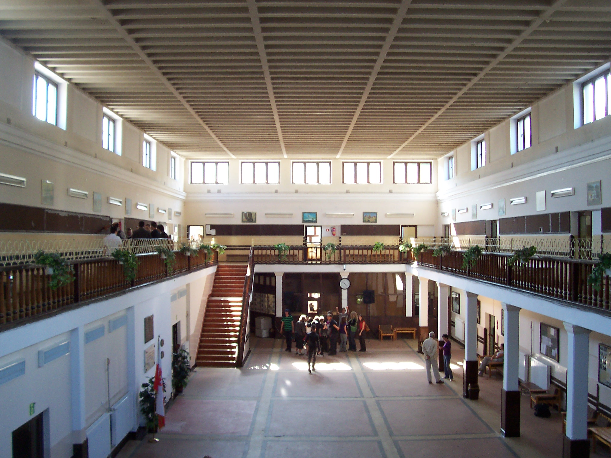 Aula V L.O. w Warszawie